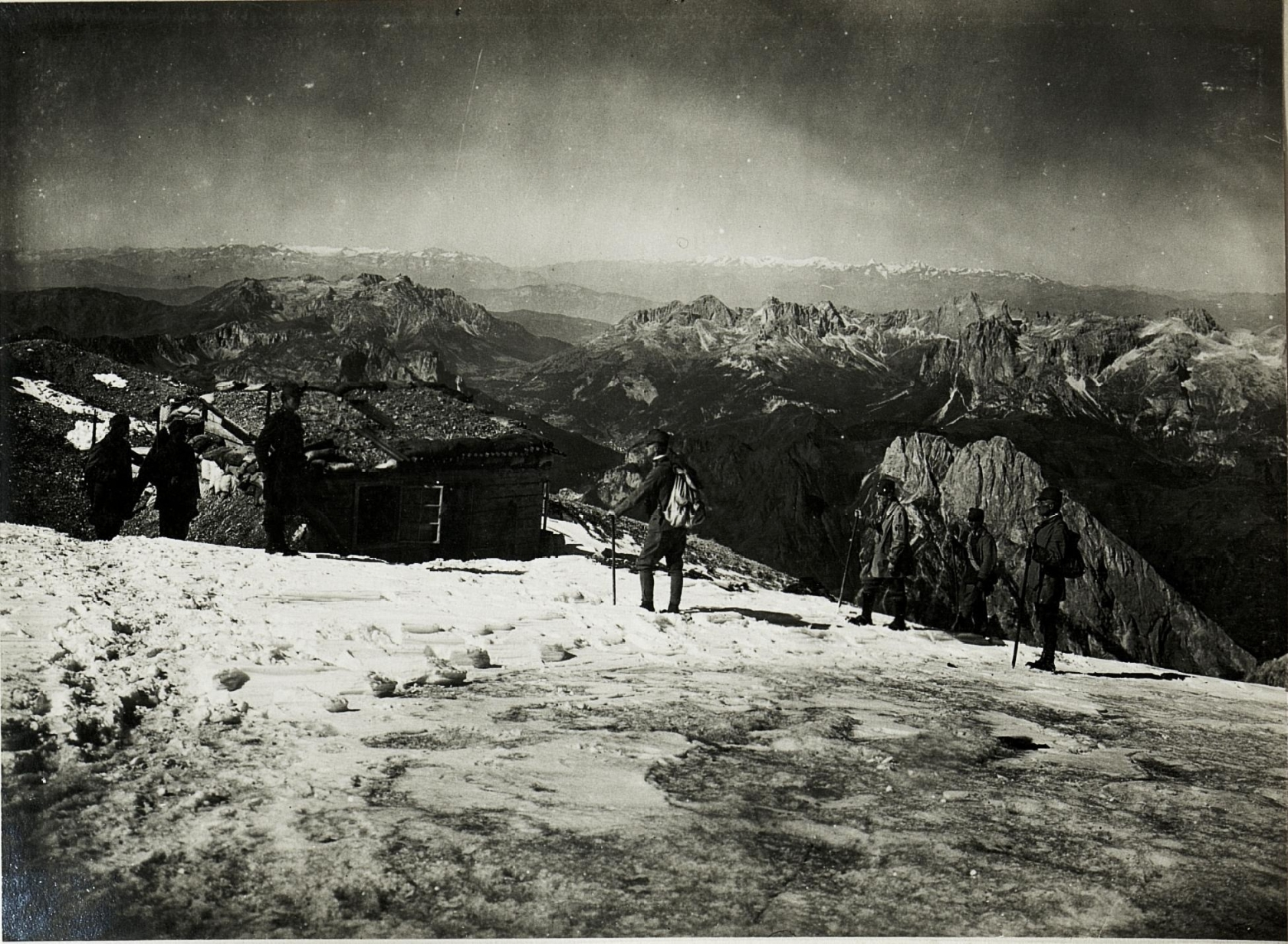 Punta.Penia: Blick gegen Rosengarten.